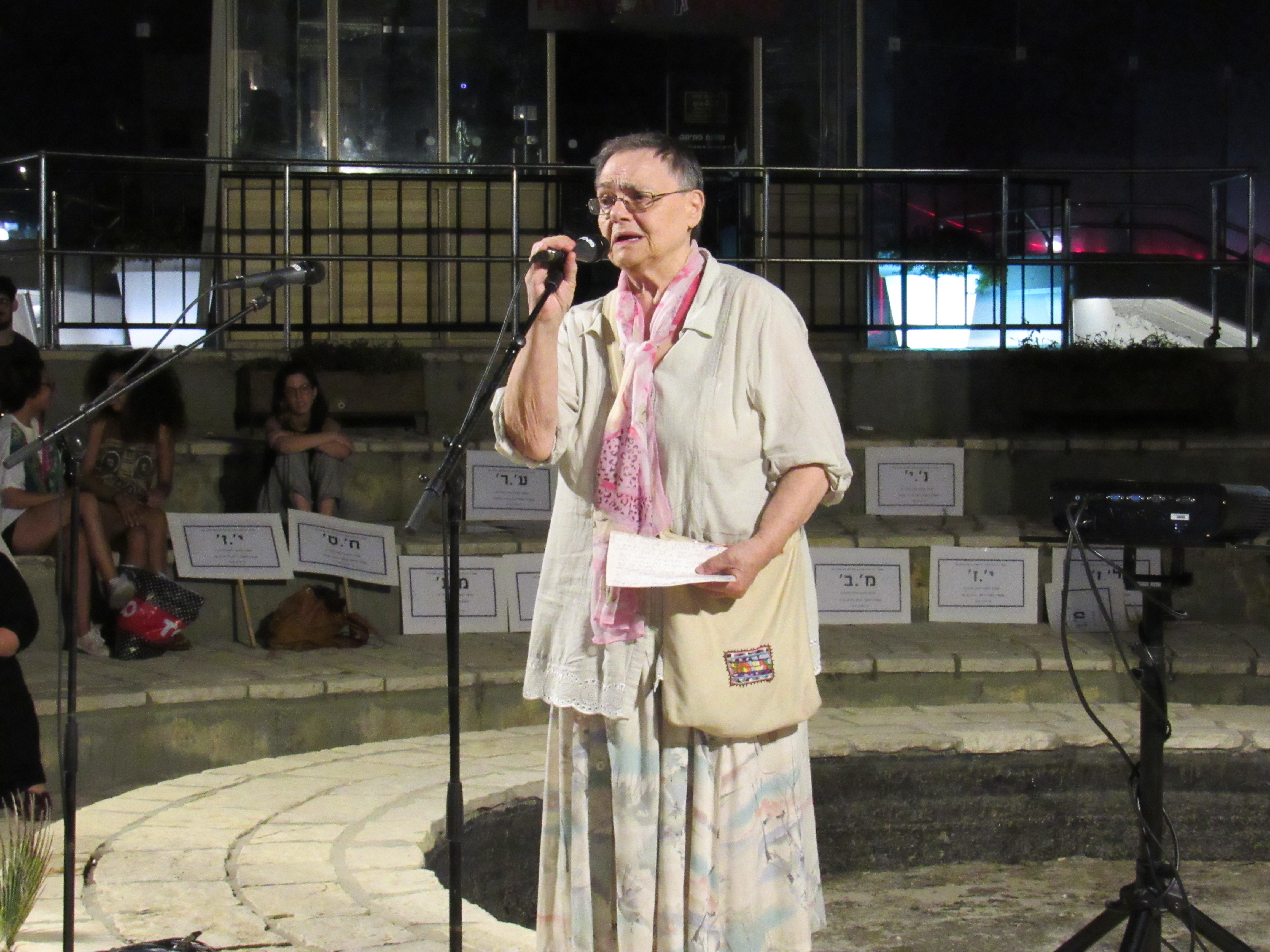 בעצרת למאבק בזנות בת"א